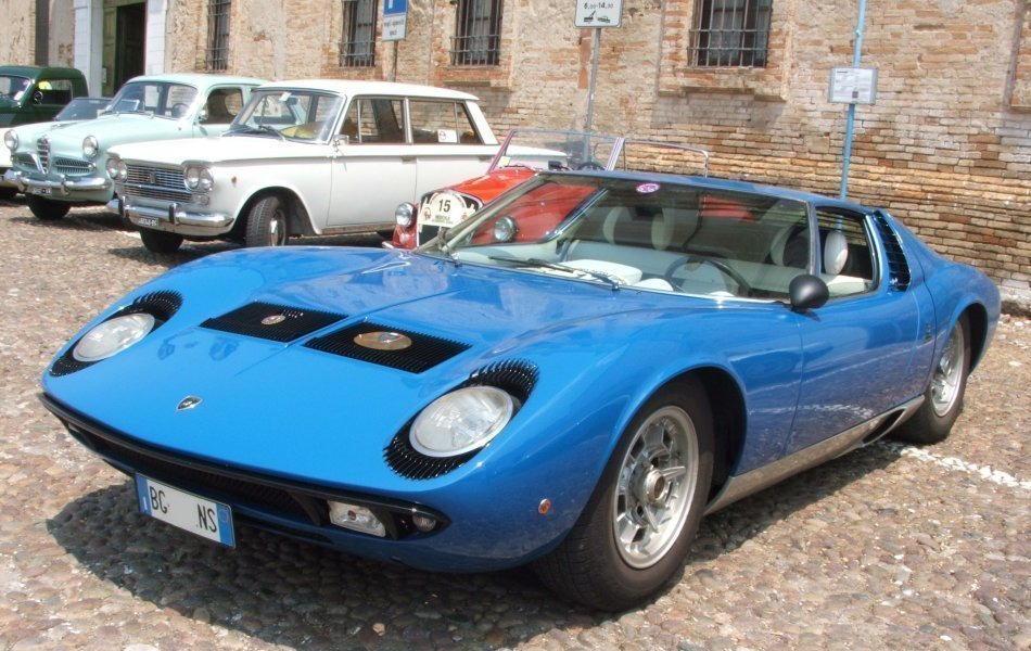 Lamborghini Miura P 400 S del 1968 fotografato al Raduno Auto Storiche di Medole nel 2007